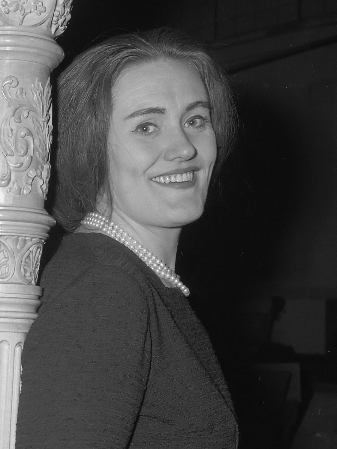 Joan Sutherland in Concertgebouw onder leiding van Fulvio Vernizzi (dirigent) 25 februari 1962